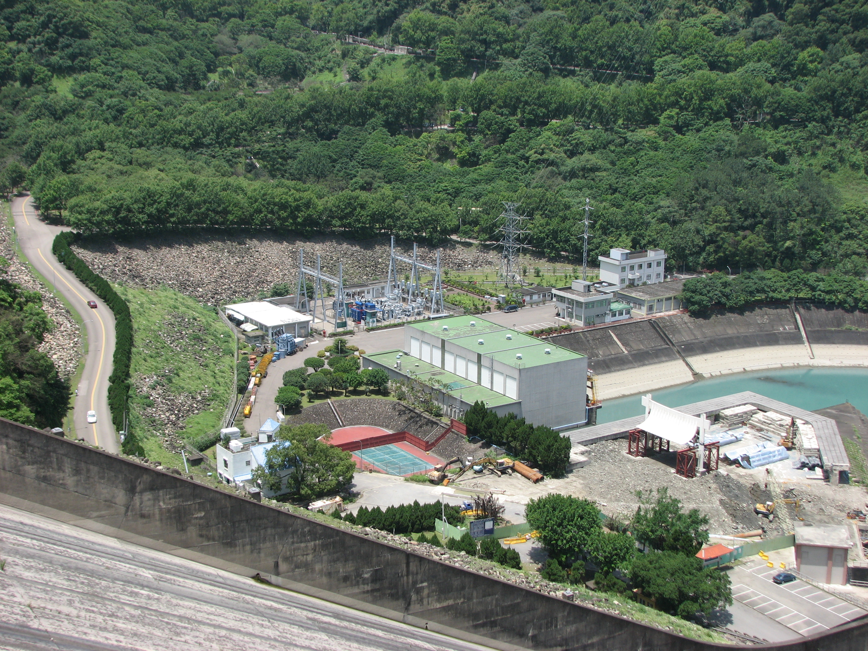 設於石門水庫大壩下游溢洪道左岸的石門發電廠